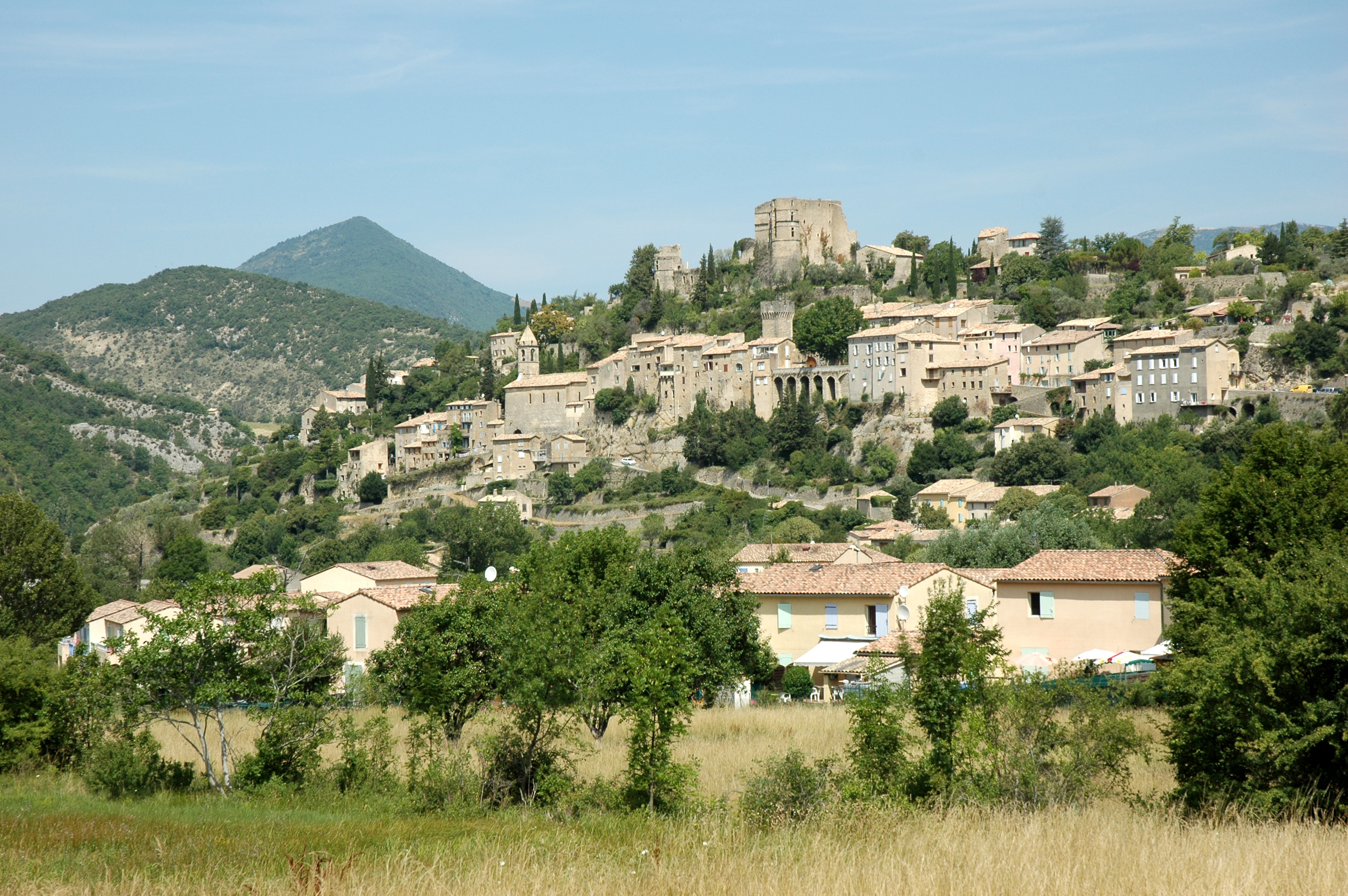 Vue générales de Montbrun-les-Bains